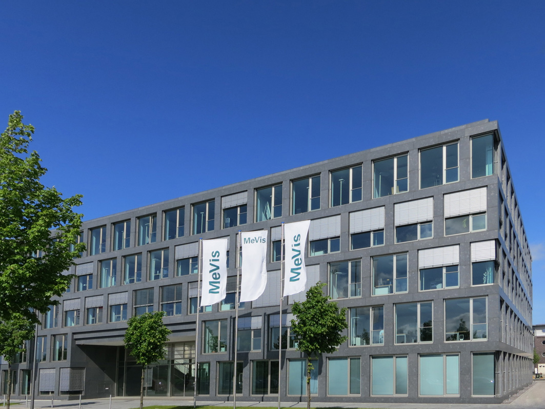 MeVis Medical Solutions AG, Company Building, Caroline-Herschel-Str. 1, Bremen, Germany